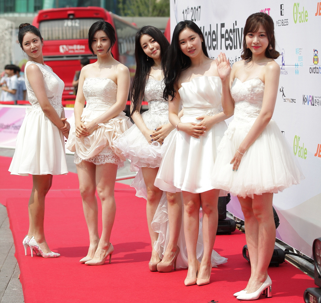 2017 아시아 모델 페스티벌 레드카펫